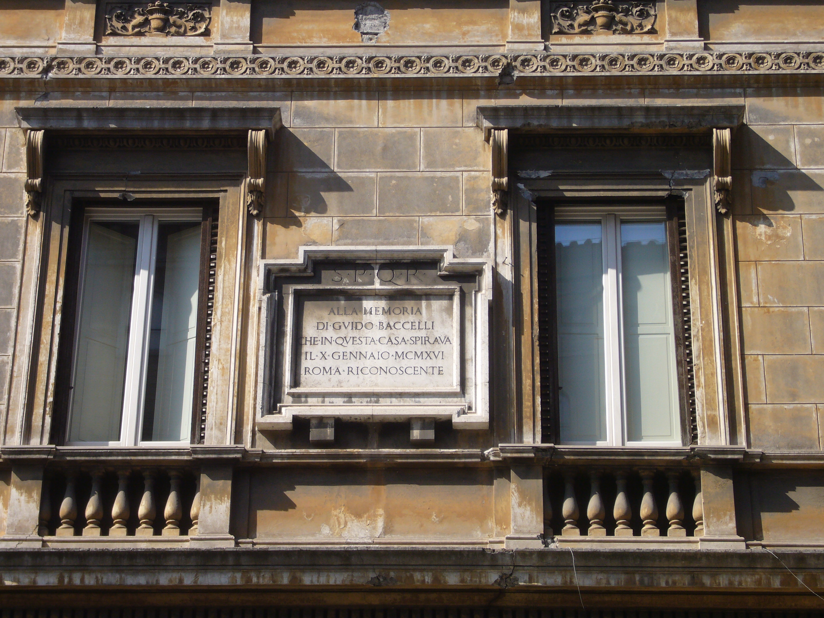 Roma, corso Vittorio Emanuele, memoria di Guido Baccelli sulla casa dove morì.